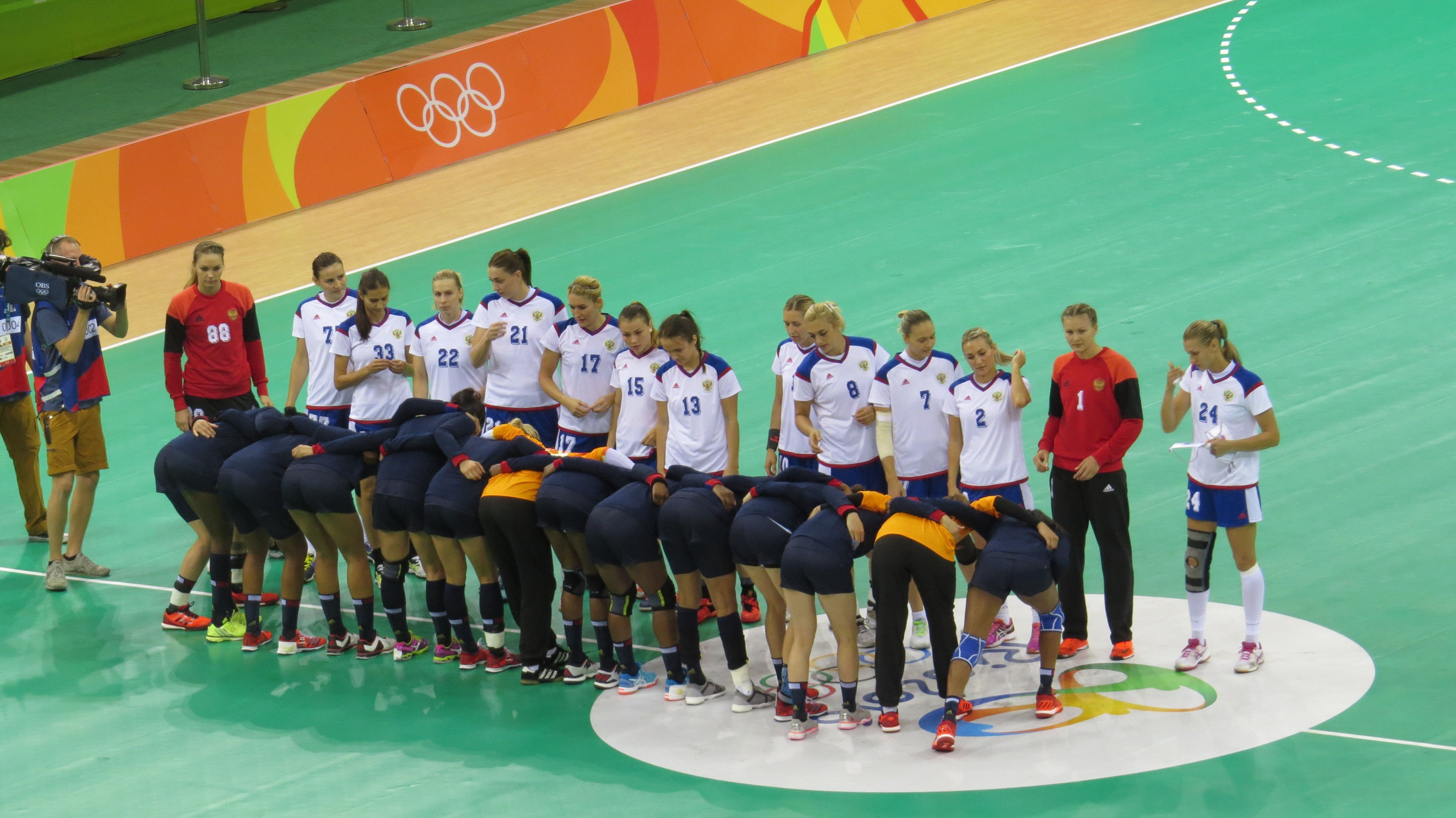 Rio 2016. sx 95